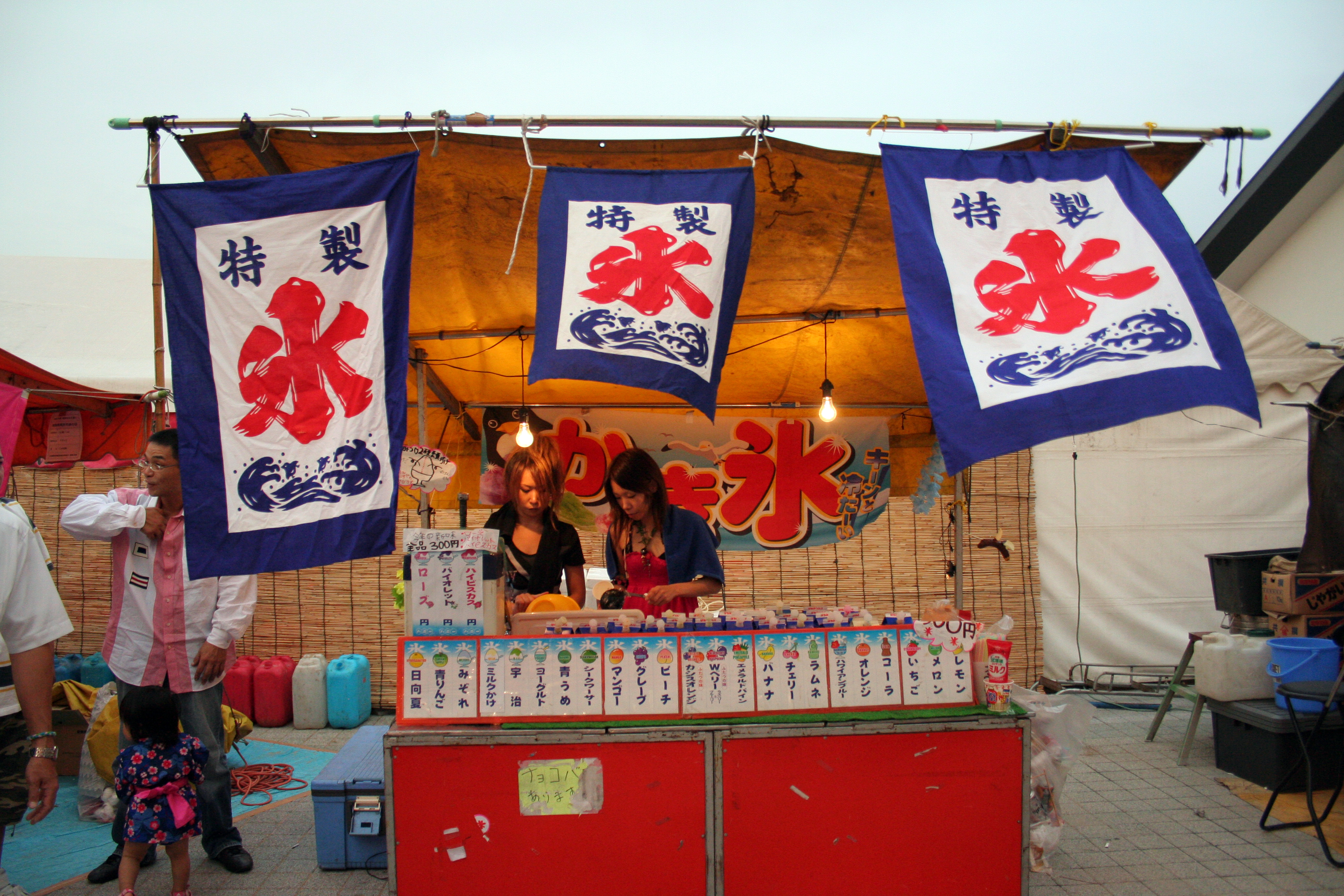 2009年6月22日から23日にかけて、姫路市大手前通りにて開催された「姫路ゆかた祭」。2つ日間にかけて行なわれた祭の風景。注意:ファイル番号及び日時は撮影時系列純にはなっておりません。また、性別、年齢、国籍などによる分類は推定で行なっております。 カキ氷屋さんの屋台。